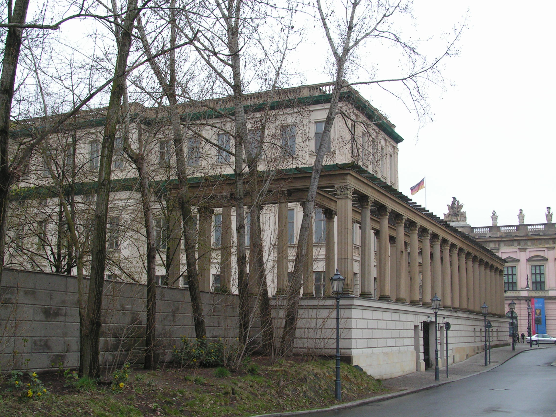 Kronprinzenpalais in Berlin, Germany. Side view.